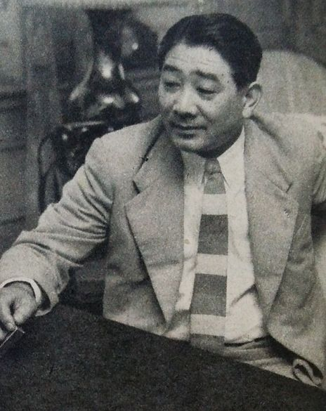 森曉